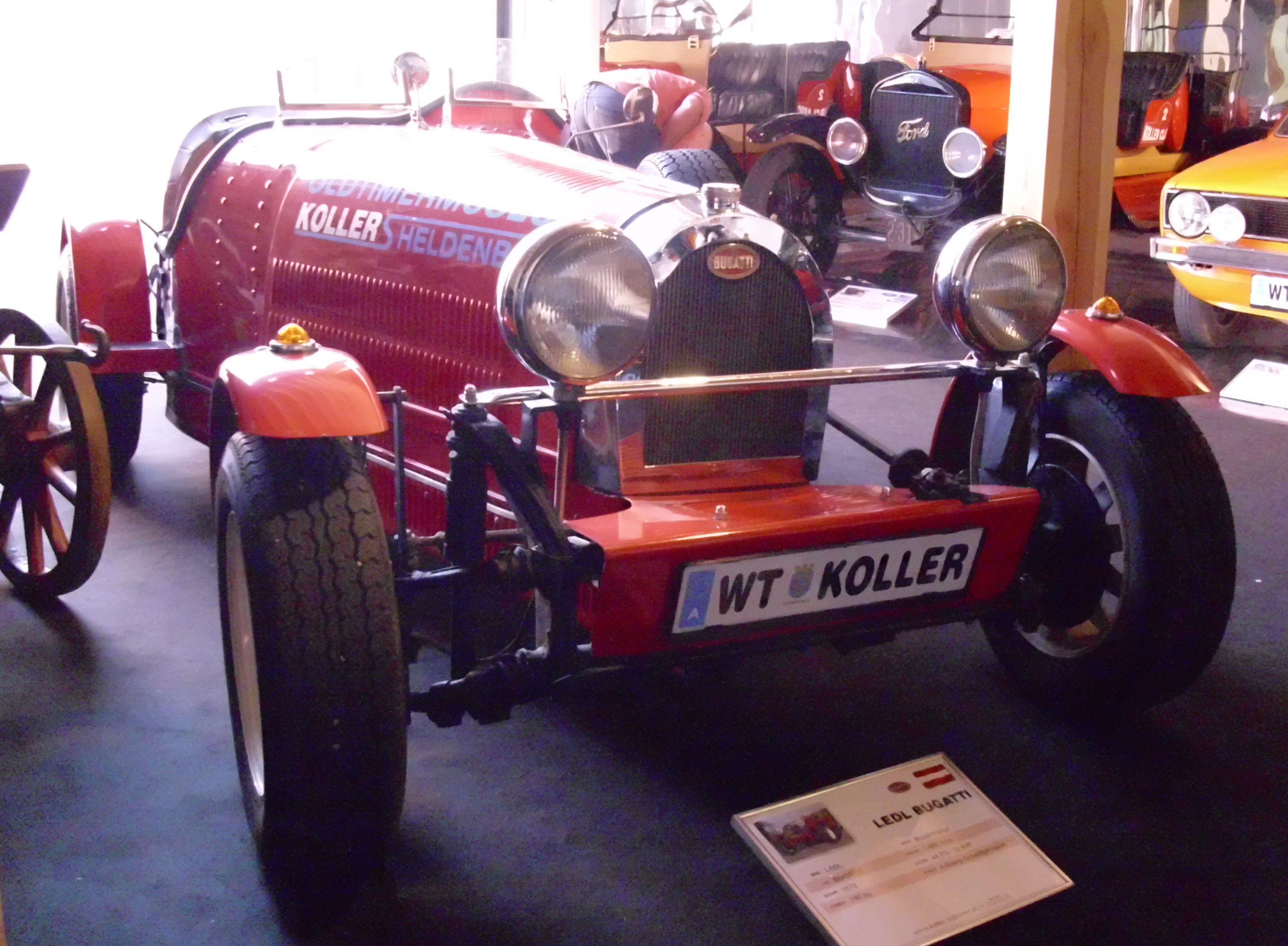 Ledl Bugatti Replica 35 B im Oldtimermuseum Koller Heldenberg